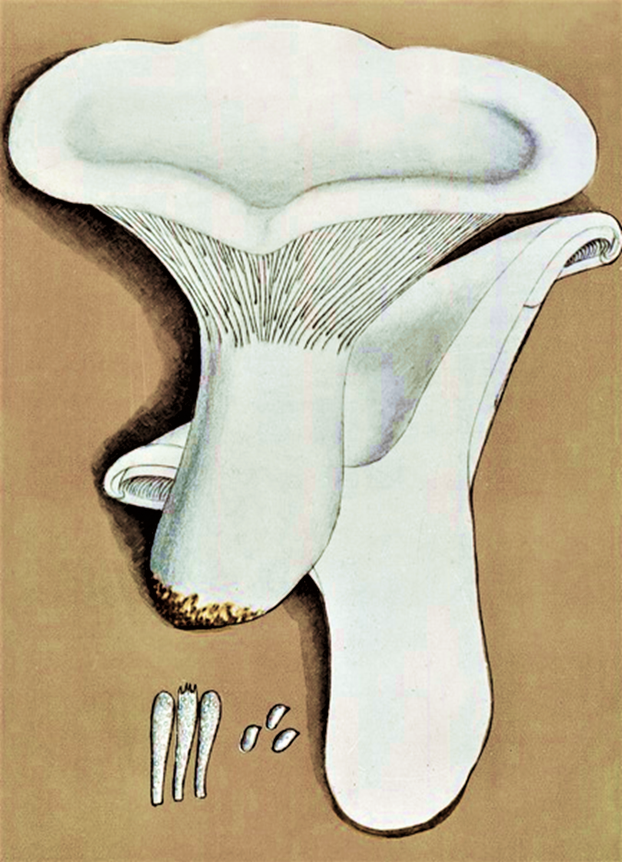 Giacomo Bresadola: Clitocybe candida Bres. (1881)